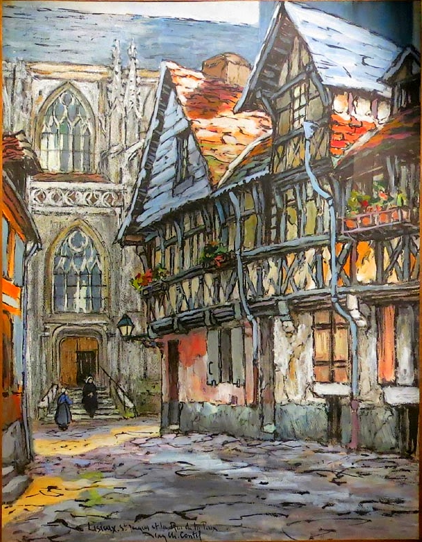 Vieille rue de Lisieux vers 1920. Lithographie par Jean-Charles Contel (1895-1928). Musée d'art et d'histoire de Lisieux.